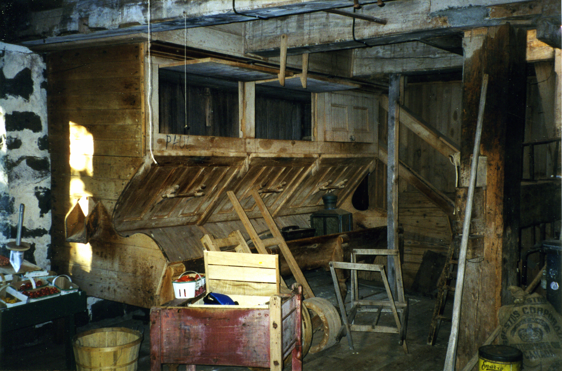 Bluteau du Moulin de la rivière Trois-Saumons, situé à Saint-Jean-Port-Joli (Chaudière-Appalaches, Québec. Moulin à eau; moulin à farine.